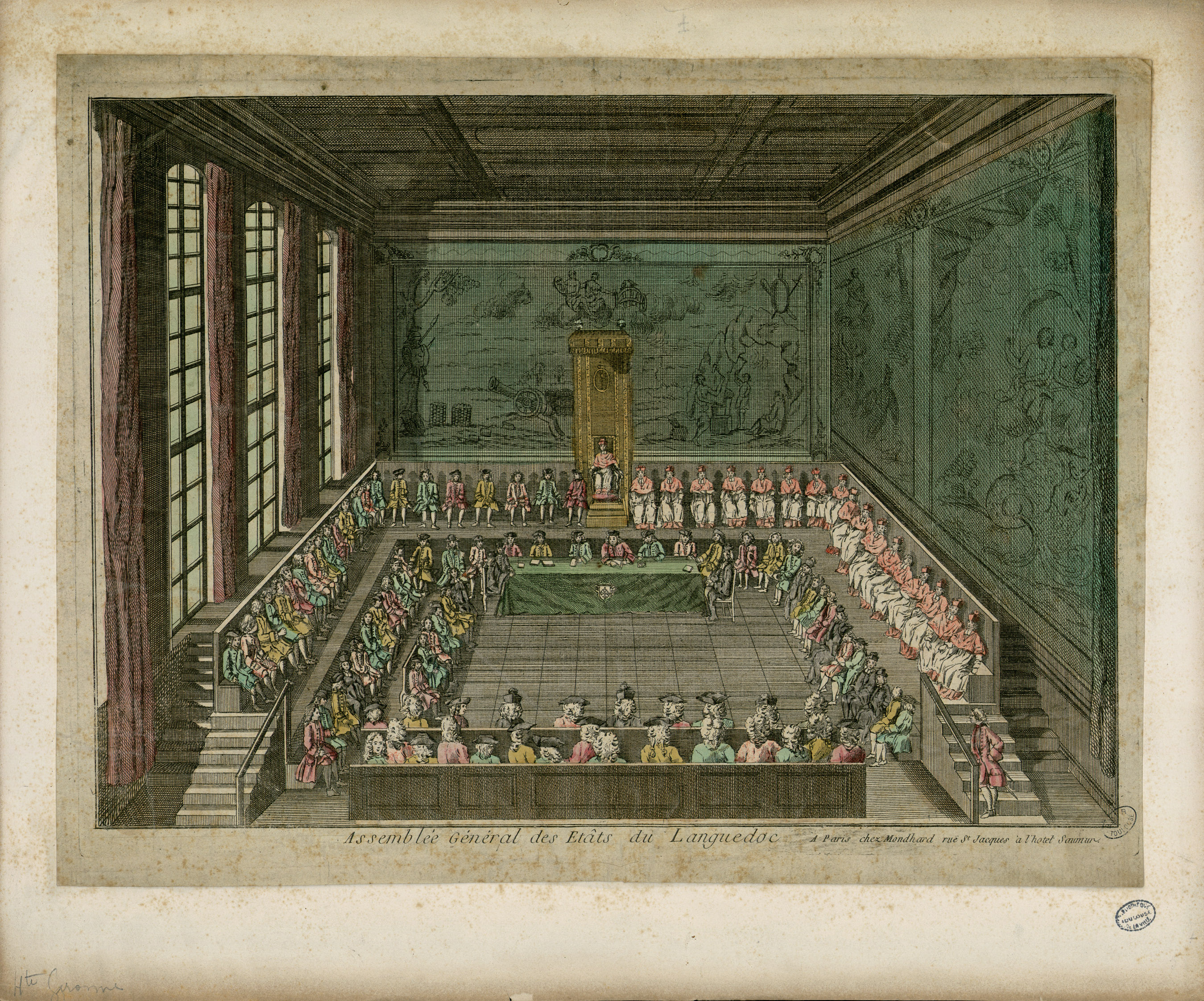 1 gravure sur cuivre en couleurs et 4 dessins à l'encre, dont 2 en couleurs Ancely, René (1876 - 1966). Possesseur